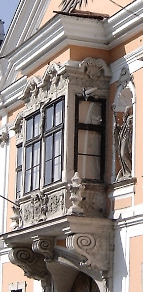 A győri Apátúr ház zárt erkélye a Széchenyi téren (Győr-Moson-Sopron megye)